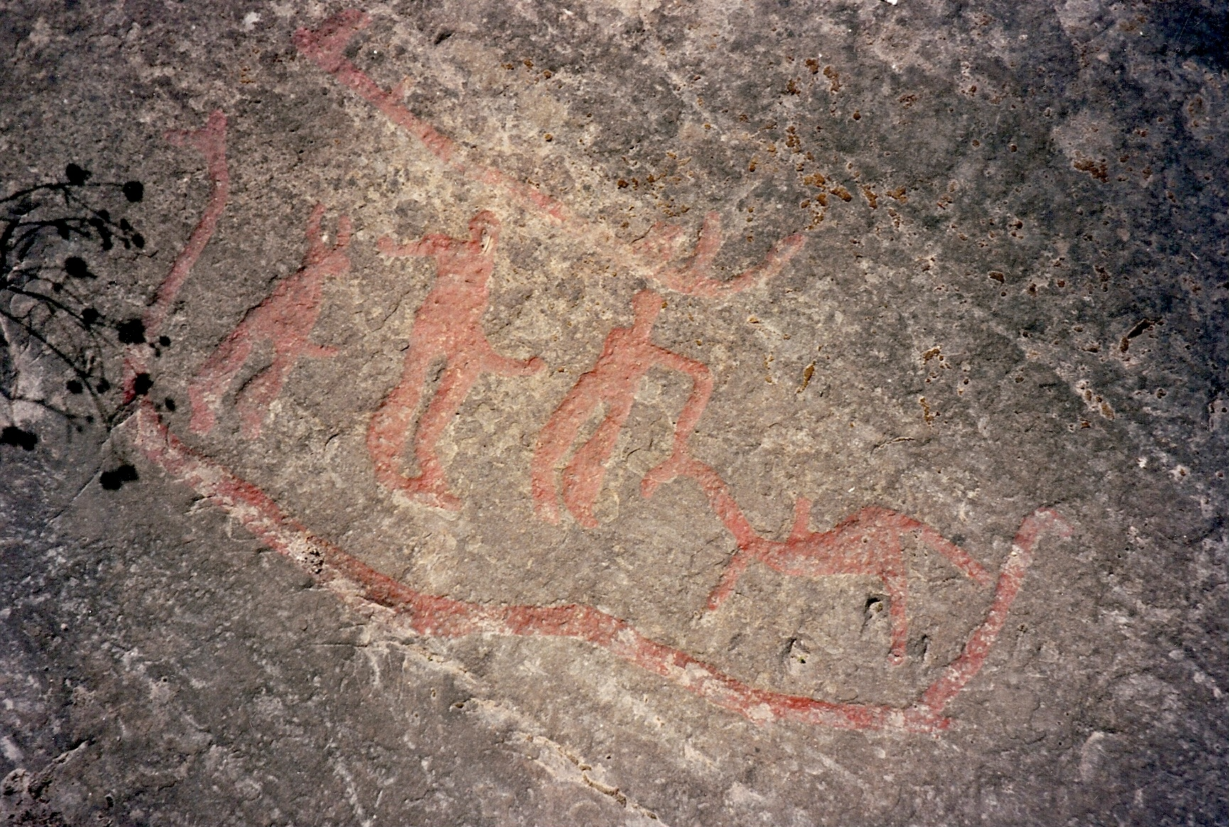 Hällristning i Blomberg på Kinnekulle. Fornlämningen har RAÄ-nummer Husaby 110:1, men låg tidigare i Källby socken (då RAÄ-nr Källby 2:1), Kinnefjärdings härad, Västergötland, Sverige. Tillhör nu Husaby socken i Götene kommun i f.d. Skaraborgs län, nu Västra Götalands län.